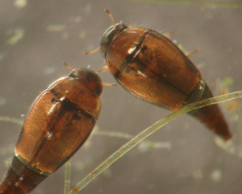 Hydroscapha natans from USA, Arizona, Sycamore Canyon